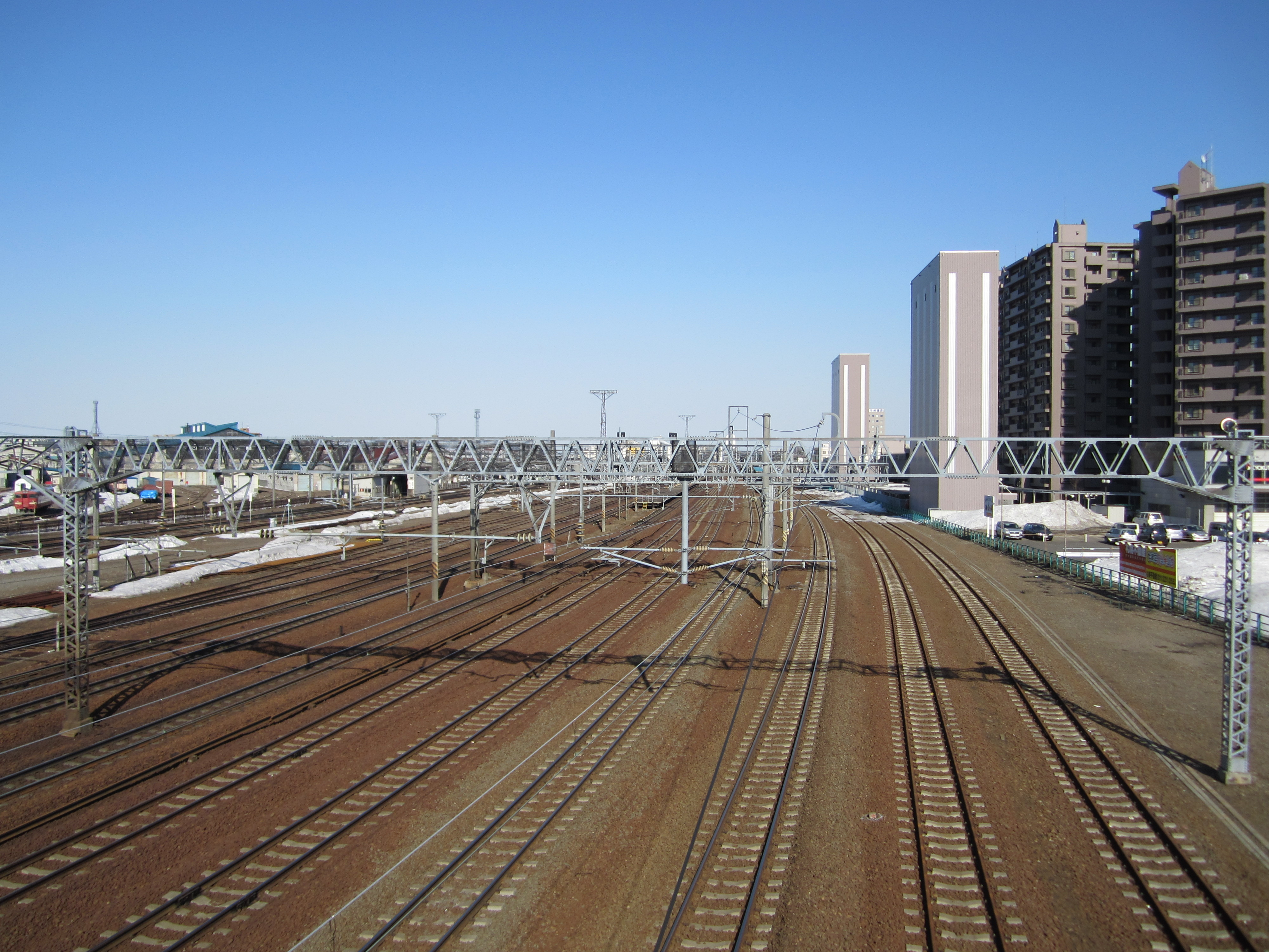 西に500m先にある歩道橋からの光景（旭川・千歳方面）